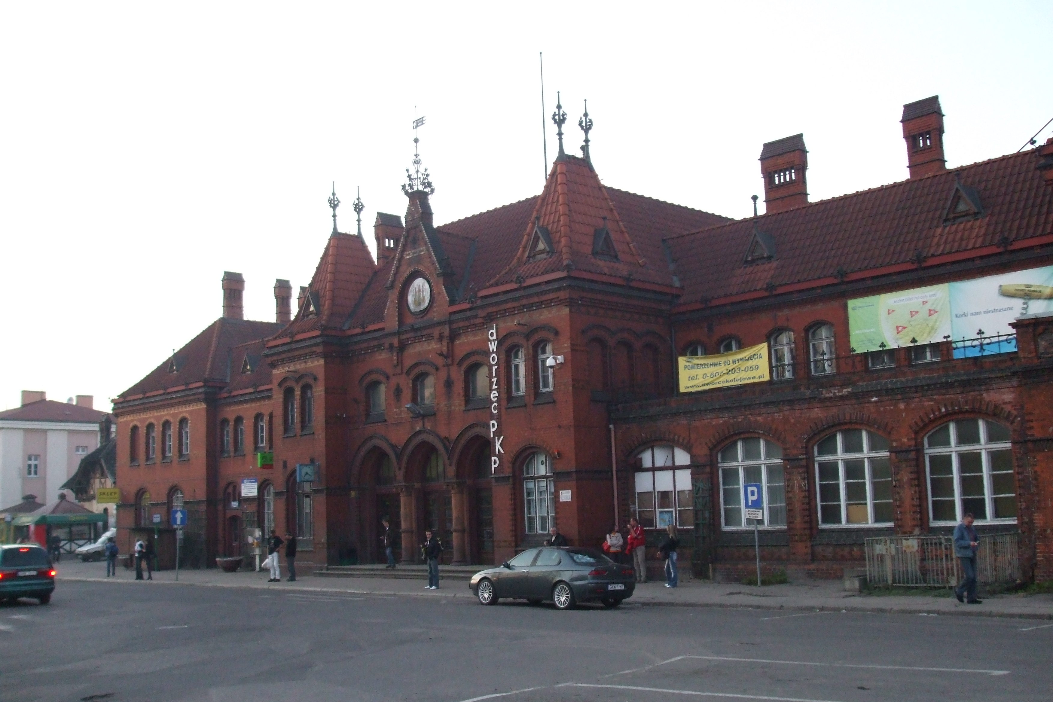 Główny dworzec kolejowy w Malborku.